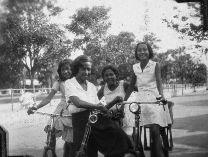 foto. Portret van een groep Indo-Europese meisjes op de fiets, Batavia